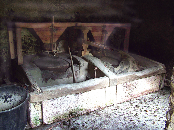 Ref.0088-Santolaya